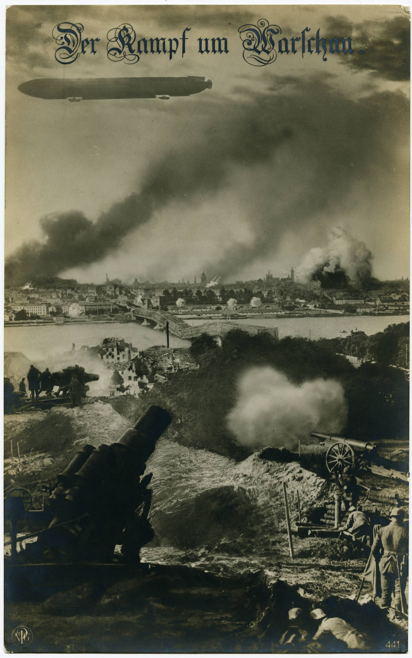 Bombardowanie Warszawy przez Niemców w 1914. Niemiecka pocztówka zatytułowana „Walka o Warszawę“.